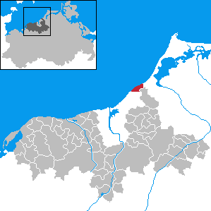 Graal-Müritz in Mecklenburg-Western Pomerania - District Bad Doberan